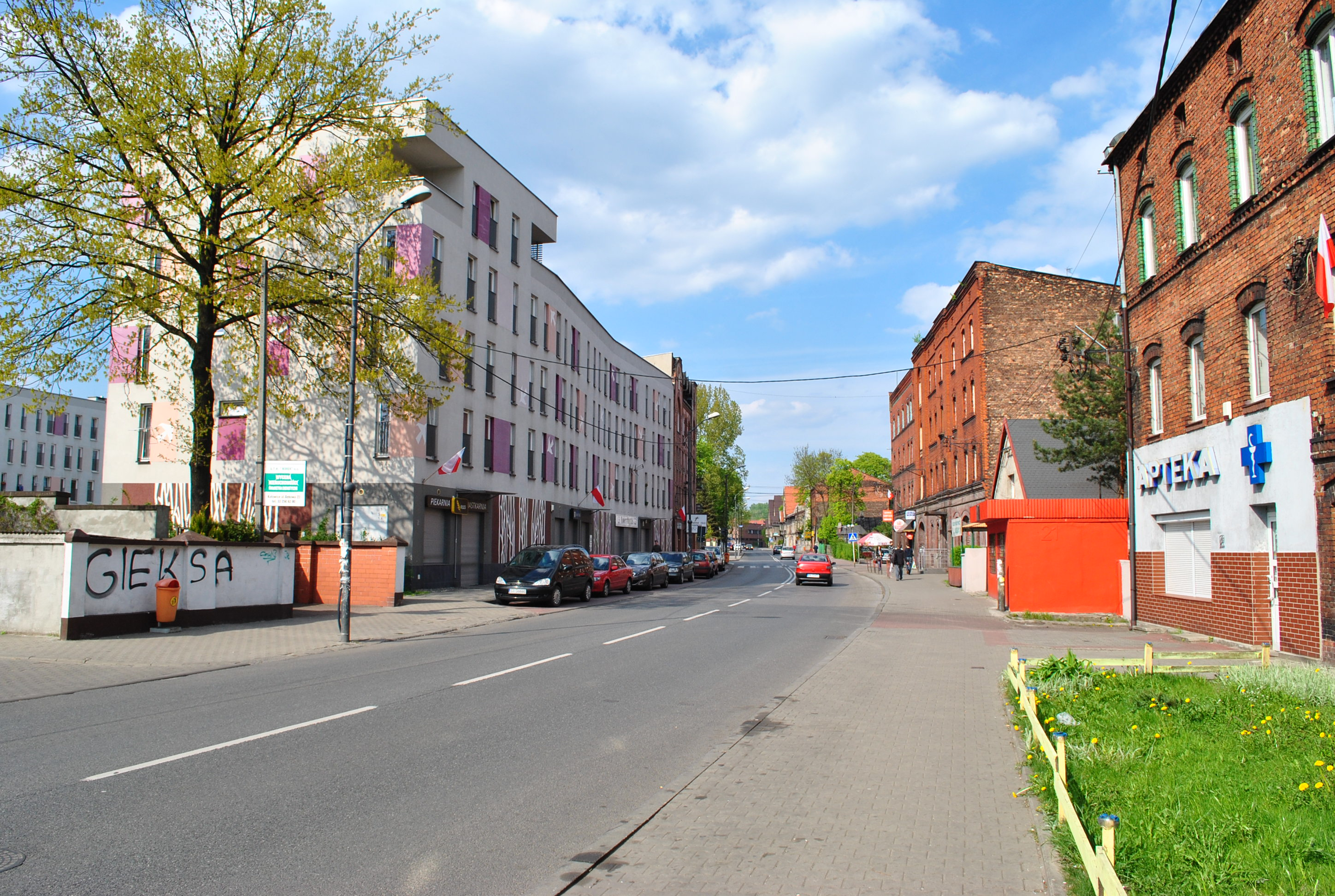 Katowice, Dąb. Ulica Dębowa